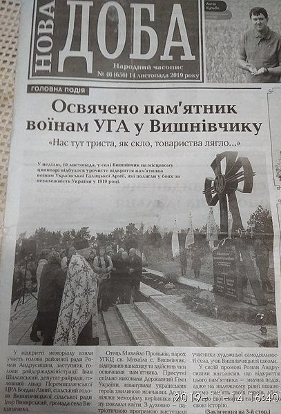 Відкриття пам'ятника воїнам УГА